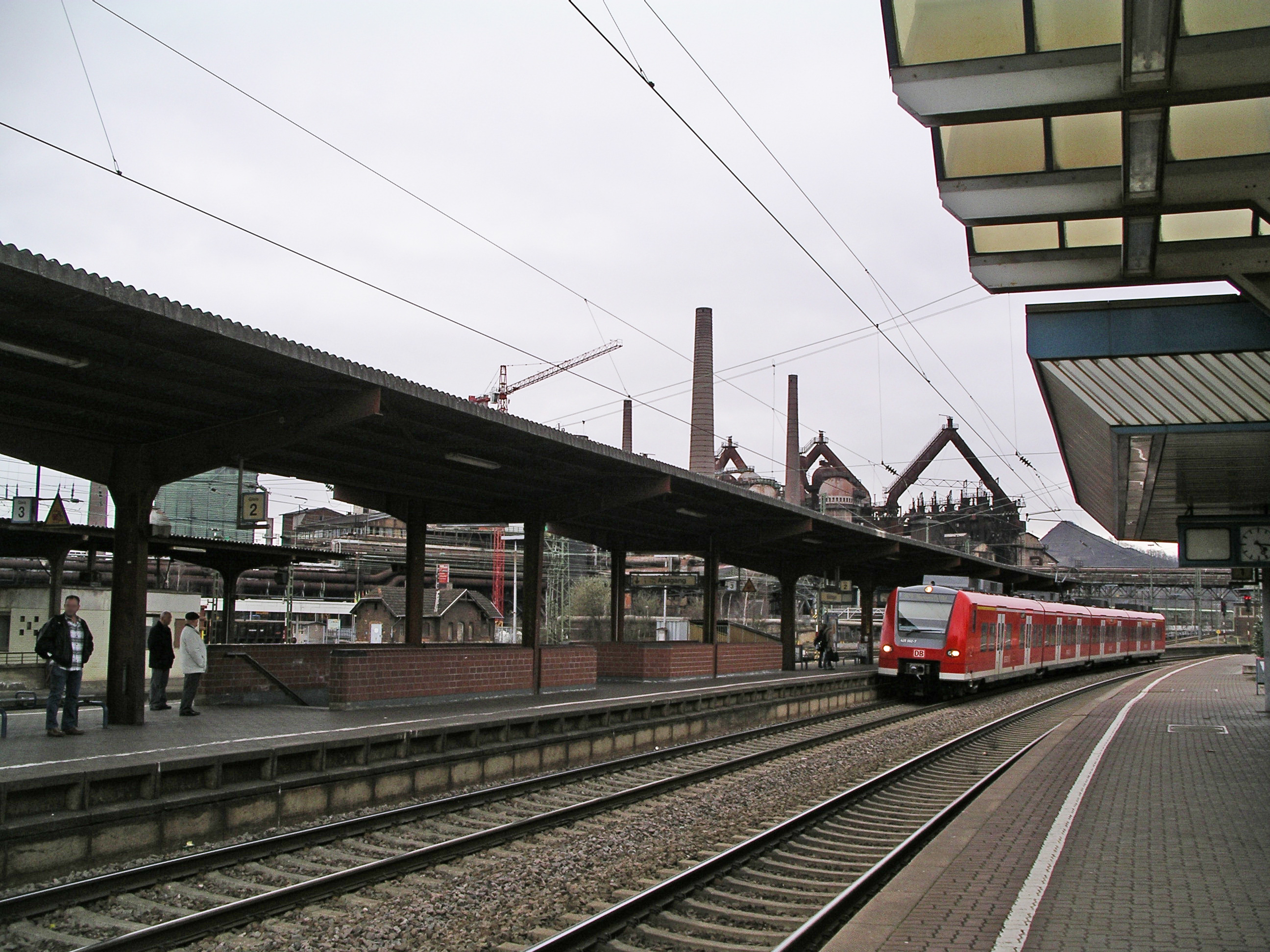 Bahnhof in Völklingen